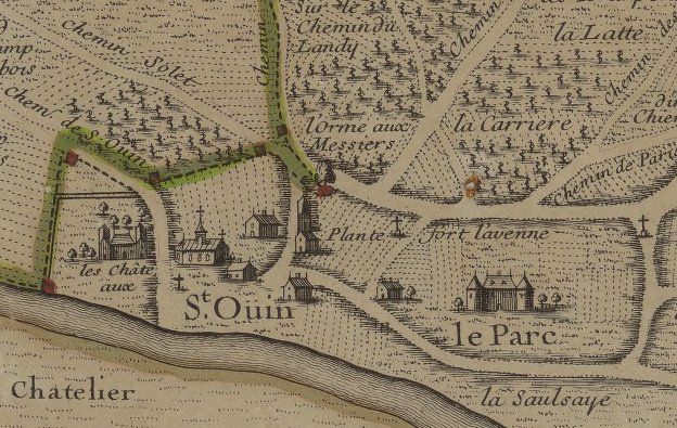 Plan du terroir de St-Denis en France et des paroisses de La Chapelle d'Aubervilliers, de la Cour Neuve, de Stains, de Pierrefitte, de Villetaneuse, d'Epinay et St-Ouen Auteur : Inselin, Charles (1673-17..). Graveur